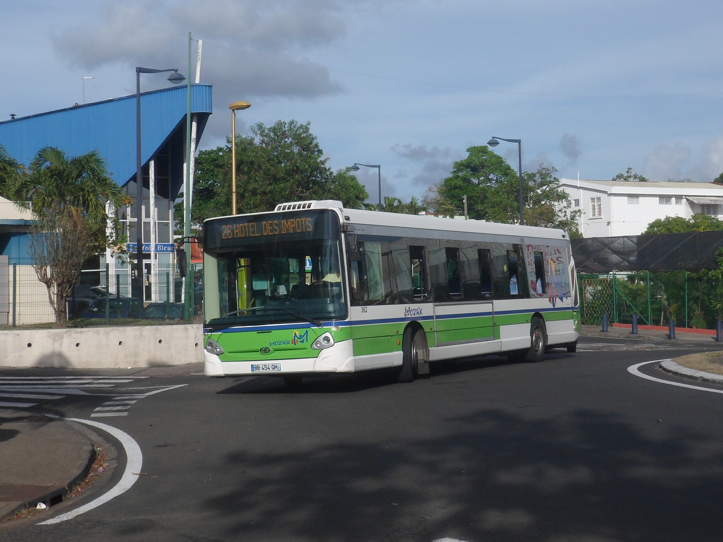 Ligne 26 du réseau Mozaïk, dans le secteur de Cluny à Schoelcher (Martinique).